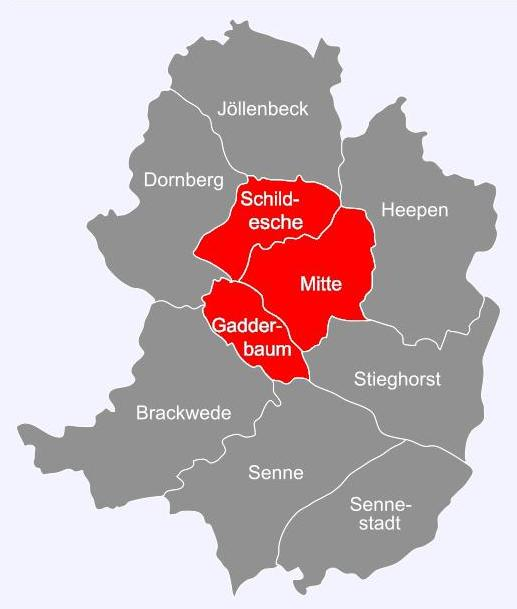 Landtagswahlkreis Bielefeld I